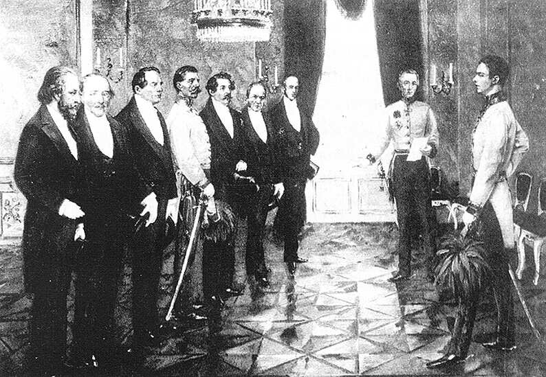 A Schwarzenberg-kormány tagjai